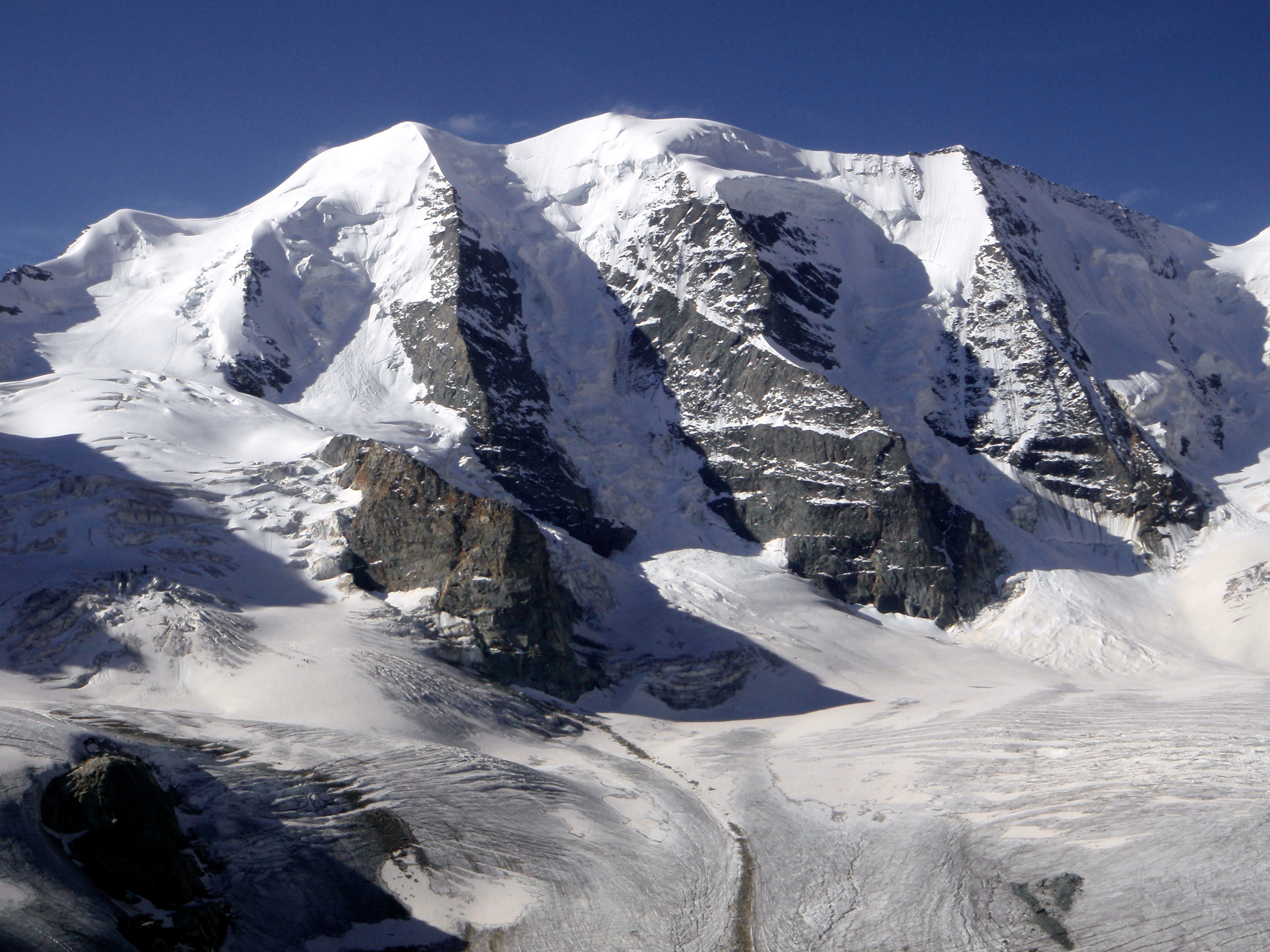 Piz Palü as seen from Diavolezza